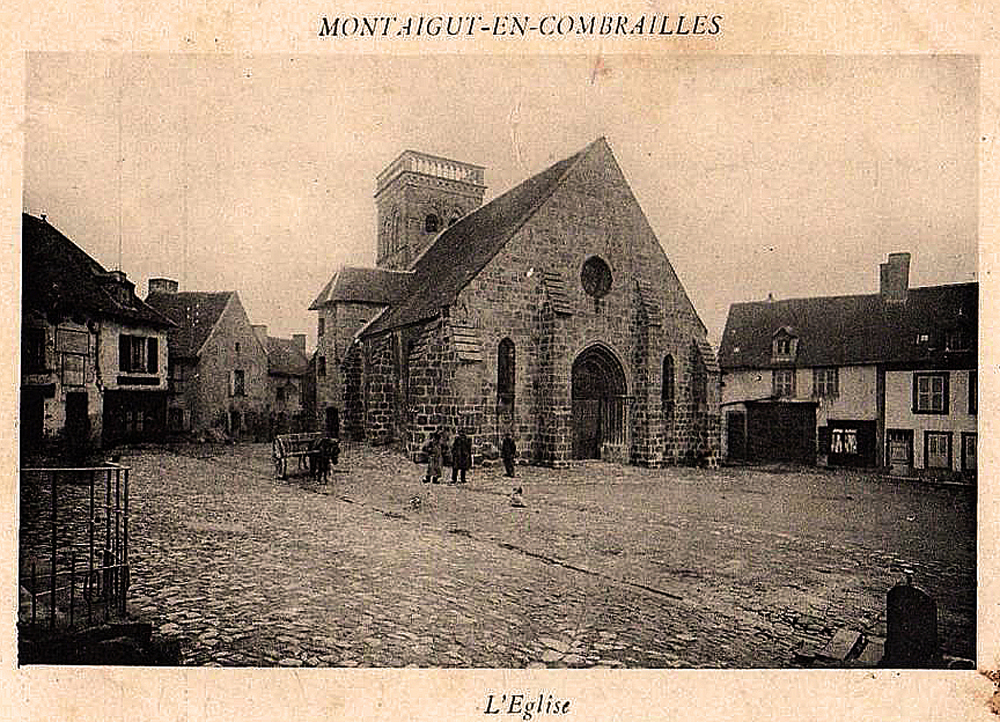 église Notre-Dame de Montaigut